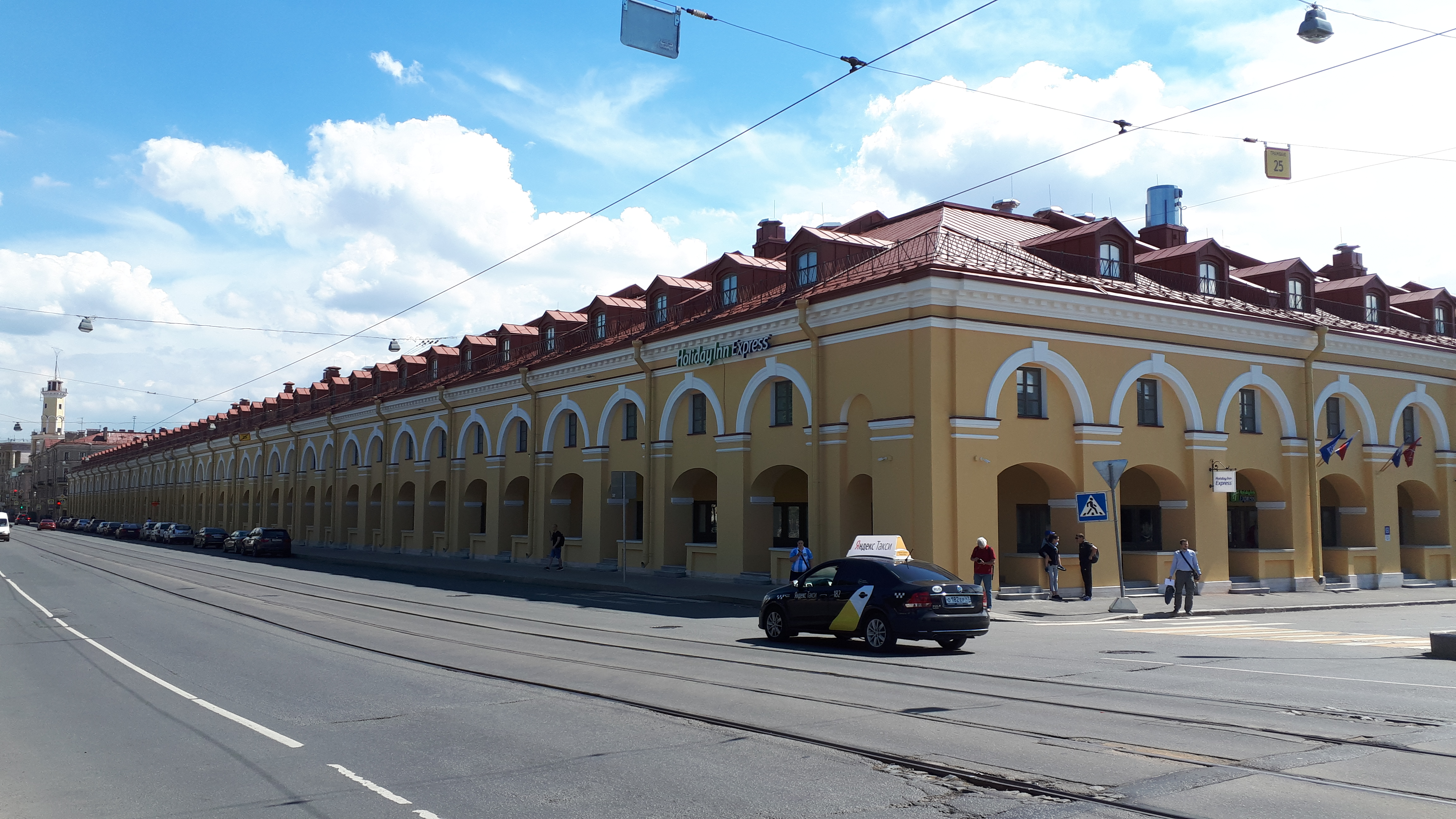 Никольский рынок: Садовая улица, 62 / набережная Крюкова канала, 18 / Никольский переулок, 1, Щепяной переулок, 1-3, 4-6, Адмиралтейский район, Санкт-Петербург